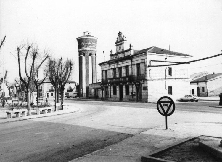 Ayuntamiento - Campaspero (Valladolid) - Campaspero. Ayuntamiento y depósito del agua. - Fotografía 119 x 82 B/N